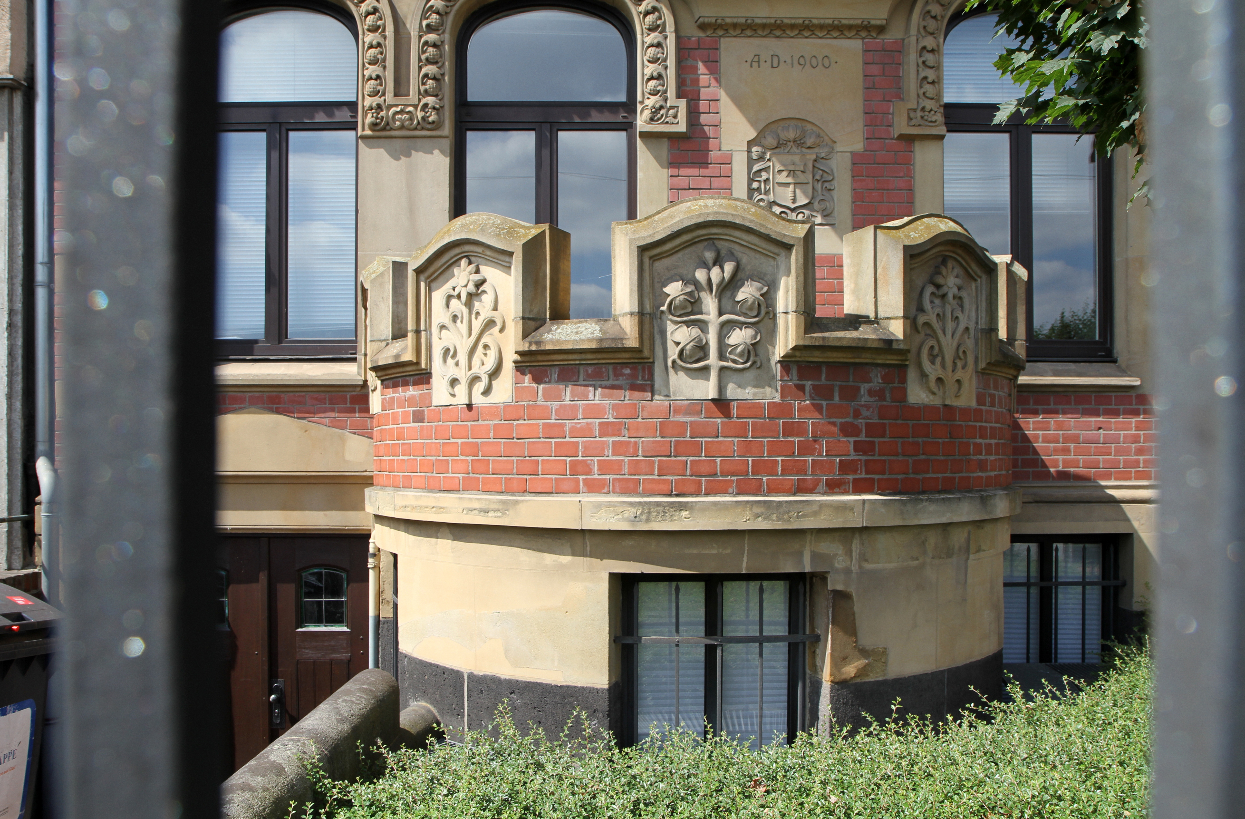 Köln-Neustadt-Nord, Konrad-Adenauer-Ufer 65